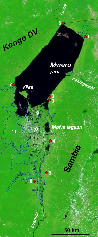 Mweru järv